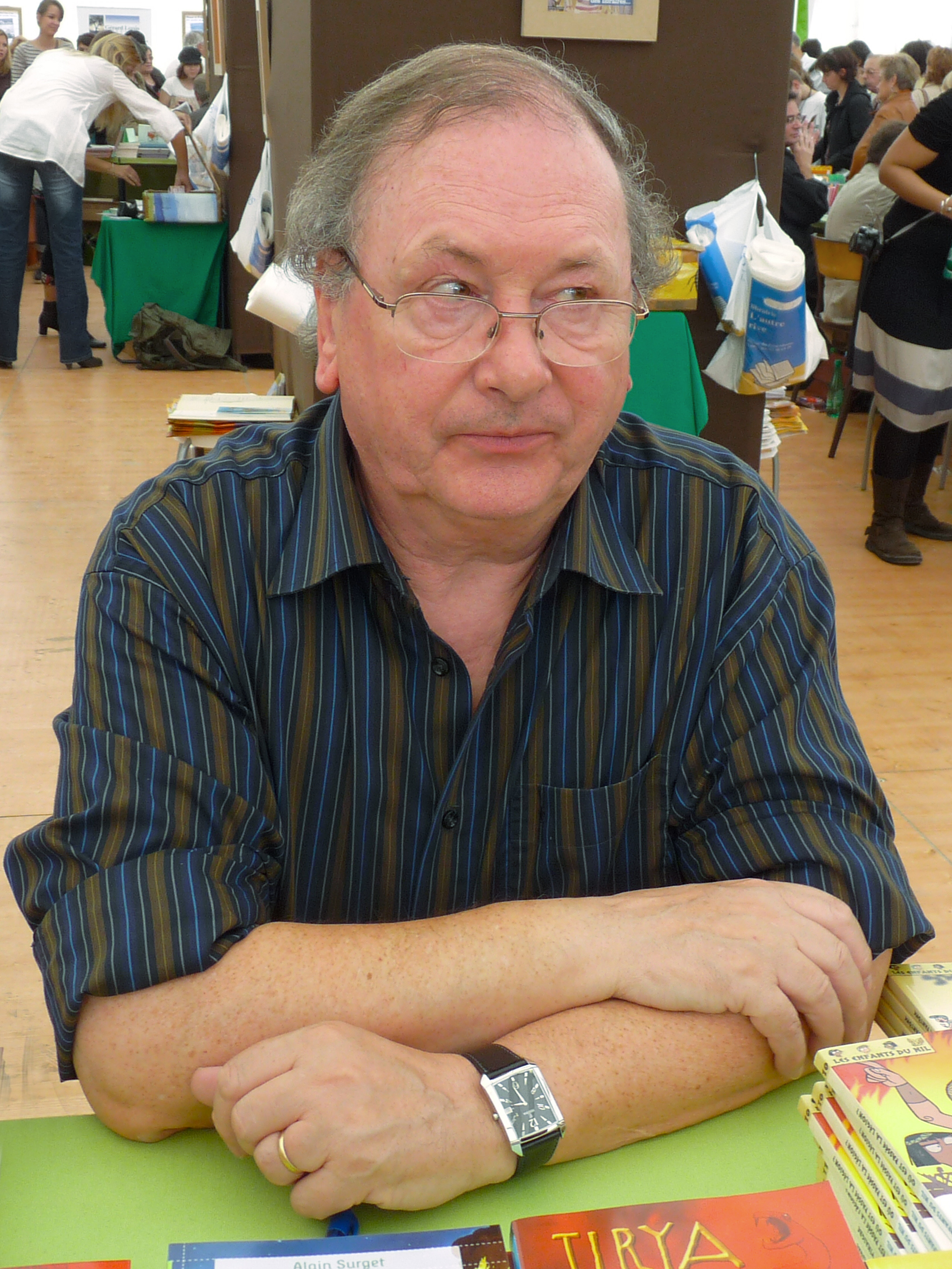 Alain Surget en dédicace dans le cadre du "Livre sur la Place", Nancy, septembre 2011